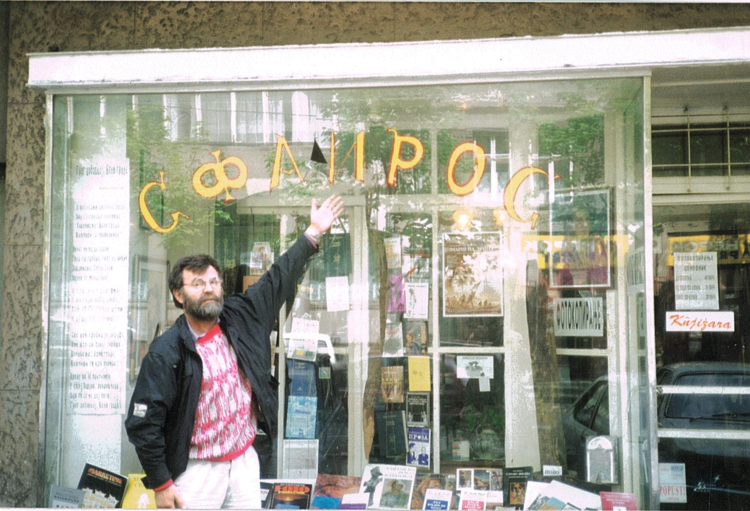 Milan Mladenović ispred svoje knjižare